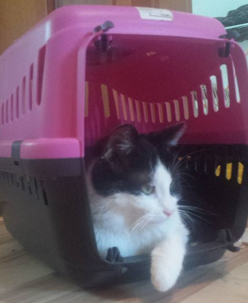 Katze im Transporter